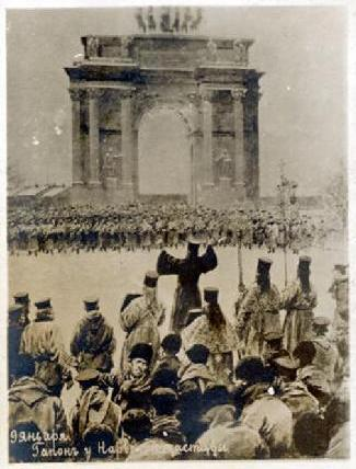 Картина неизвестного художника "9 января. Гапон у Нарвской заставы".